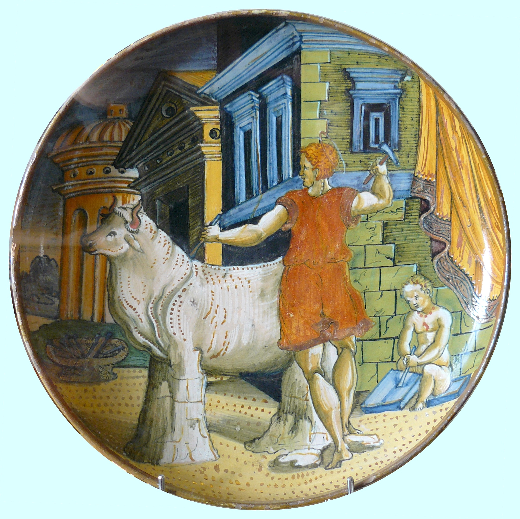 Gubbio, coupe basse datée 1533, décors à istoriato et reflets métalliques : Dédale sculptant la statue d'une vache - Musée national de céramique, Sèvres (Hauts-de-Seine, France) - Inv n° MNC 2472